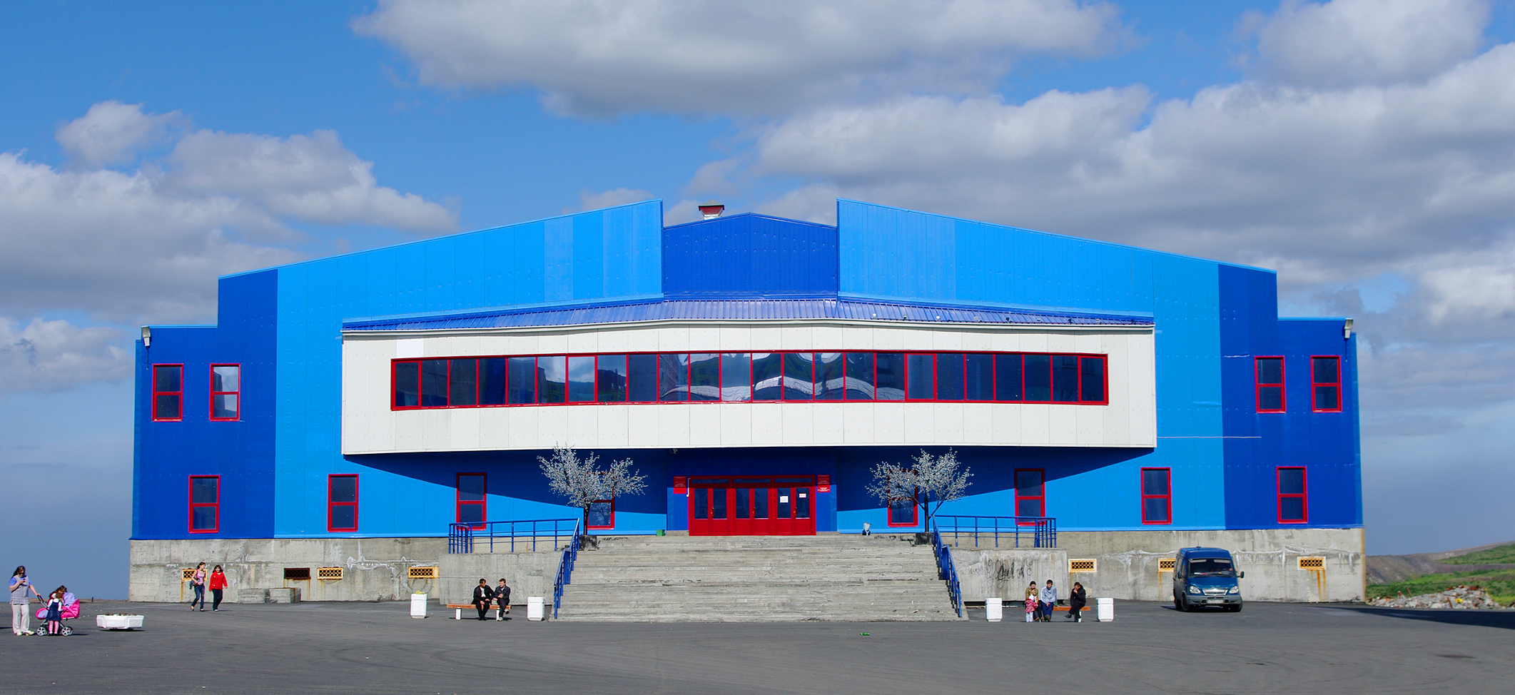 Ледовый дворец спорта в Кайеркане.